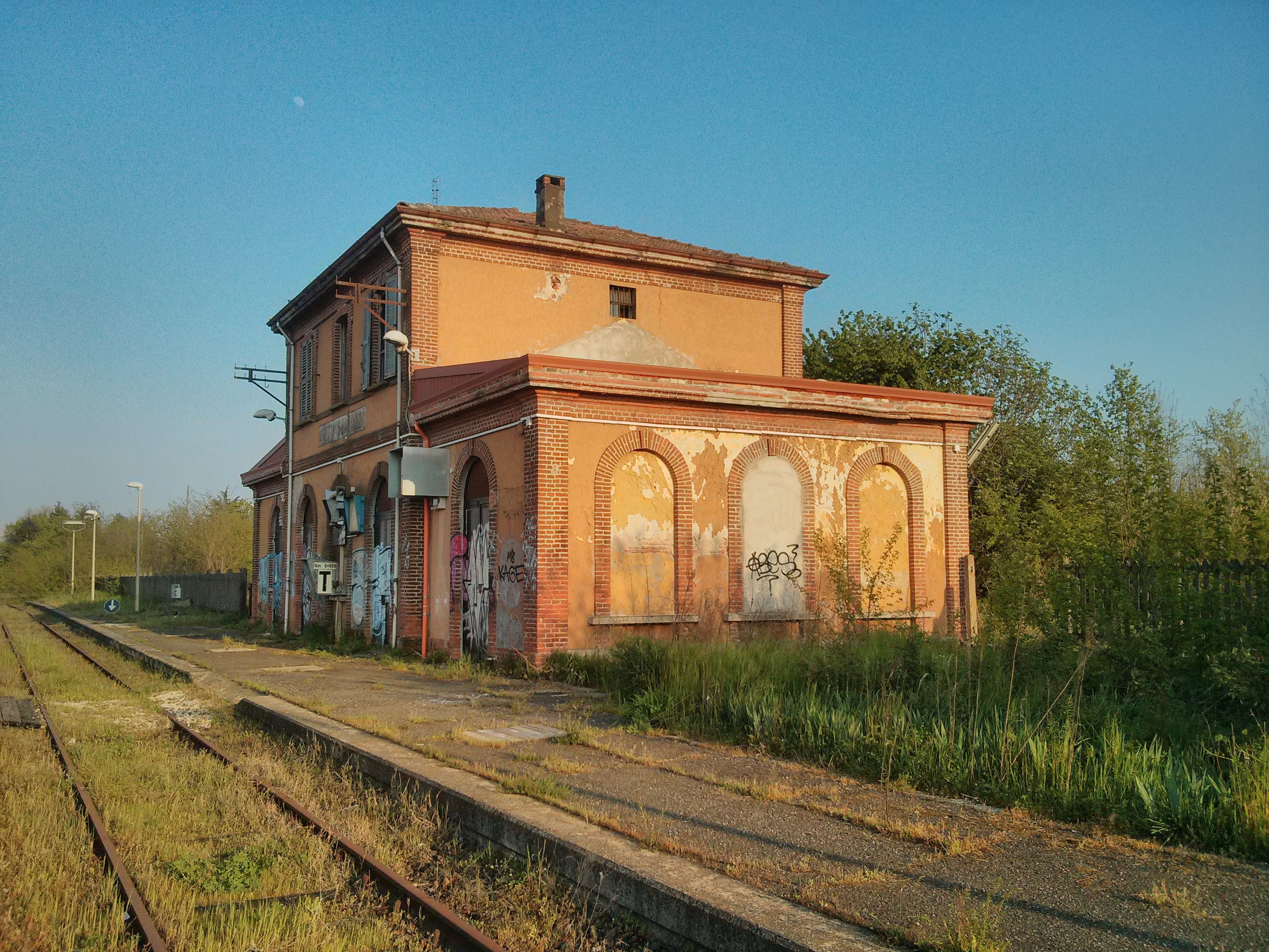 Foto al tramonto della stazione di Motta San Damiano